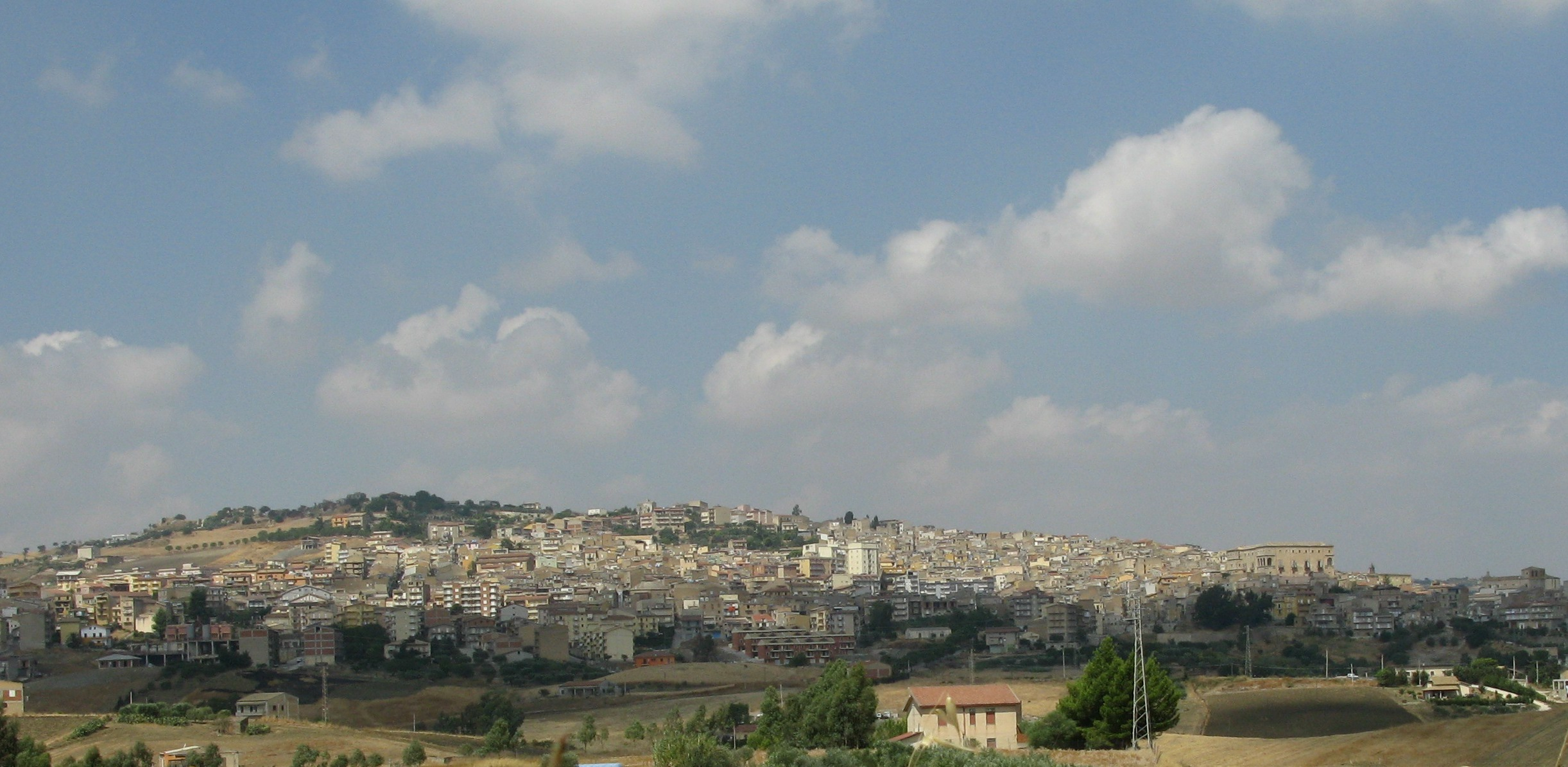 Panorama di Aragona.